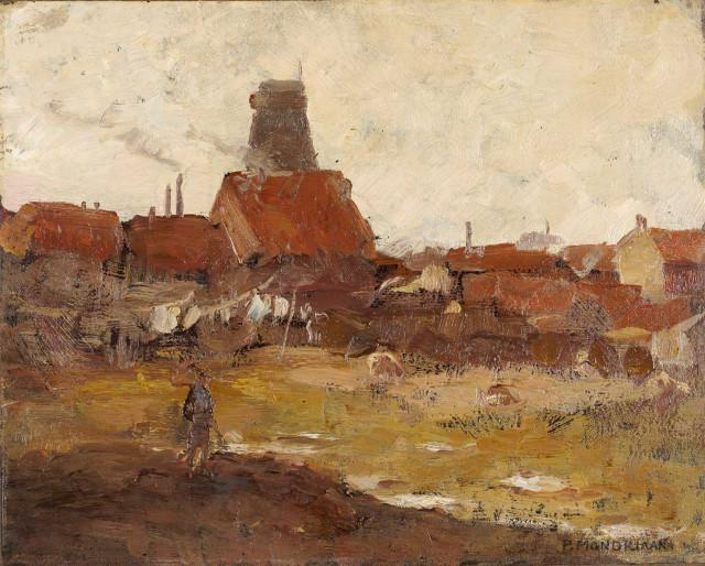 Gezicht op de Schinkelbuurt. fmetingen